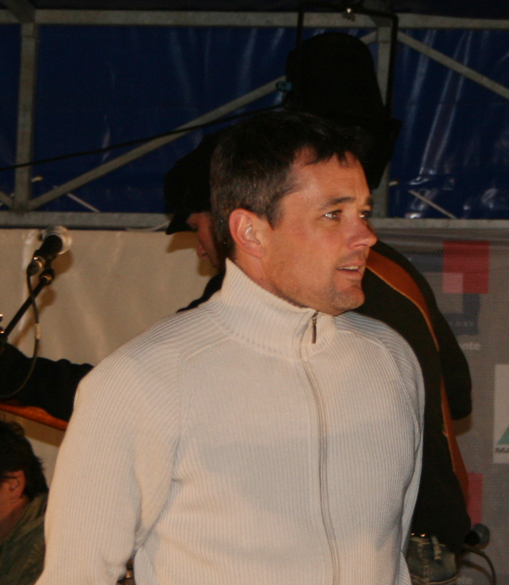 Description =Gildas Mahé. Soirée présentation des skippers a Belle-Ile lors du Trophée BPE Source =Photo taken by Remi Jouan Date =Mars 2007 Author =Remi Jouan